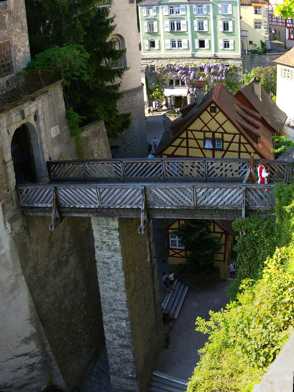 Meersburg - Übergang zwischen Burg Meersburg (links) und Neuem Schloss (nach rechts)